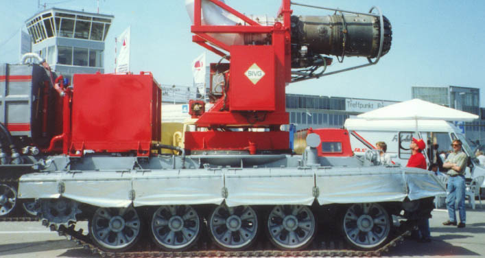 Düsenpanzer